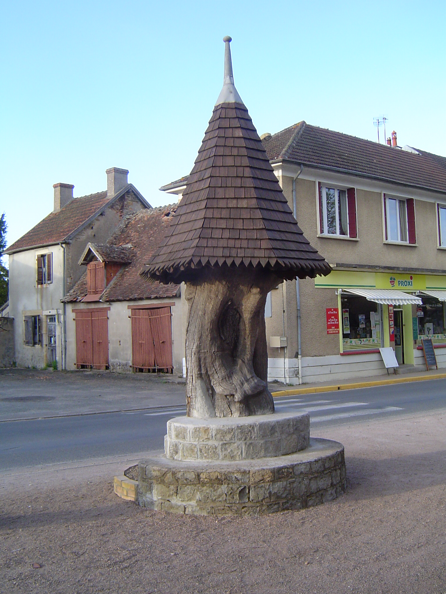 Gannay-sur-Loire (place de l'église)